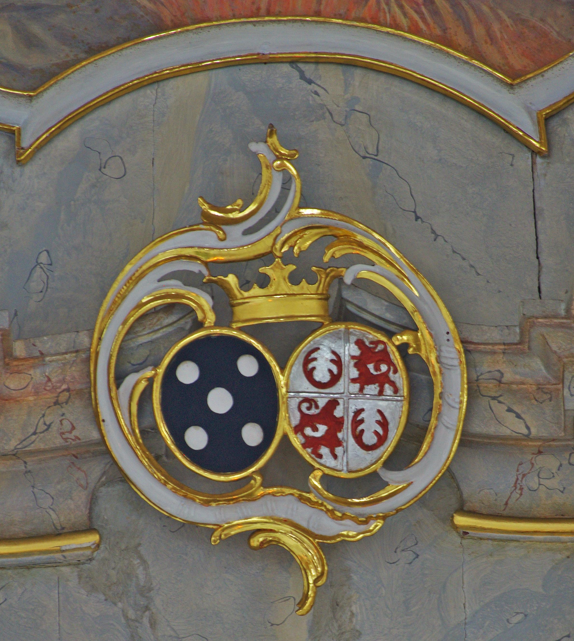 Pfarrkirche Maria in der Zarten in Hinterzarten. Allianzwappen Sickingen / Schenk von Castell am linken Altar.